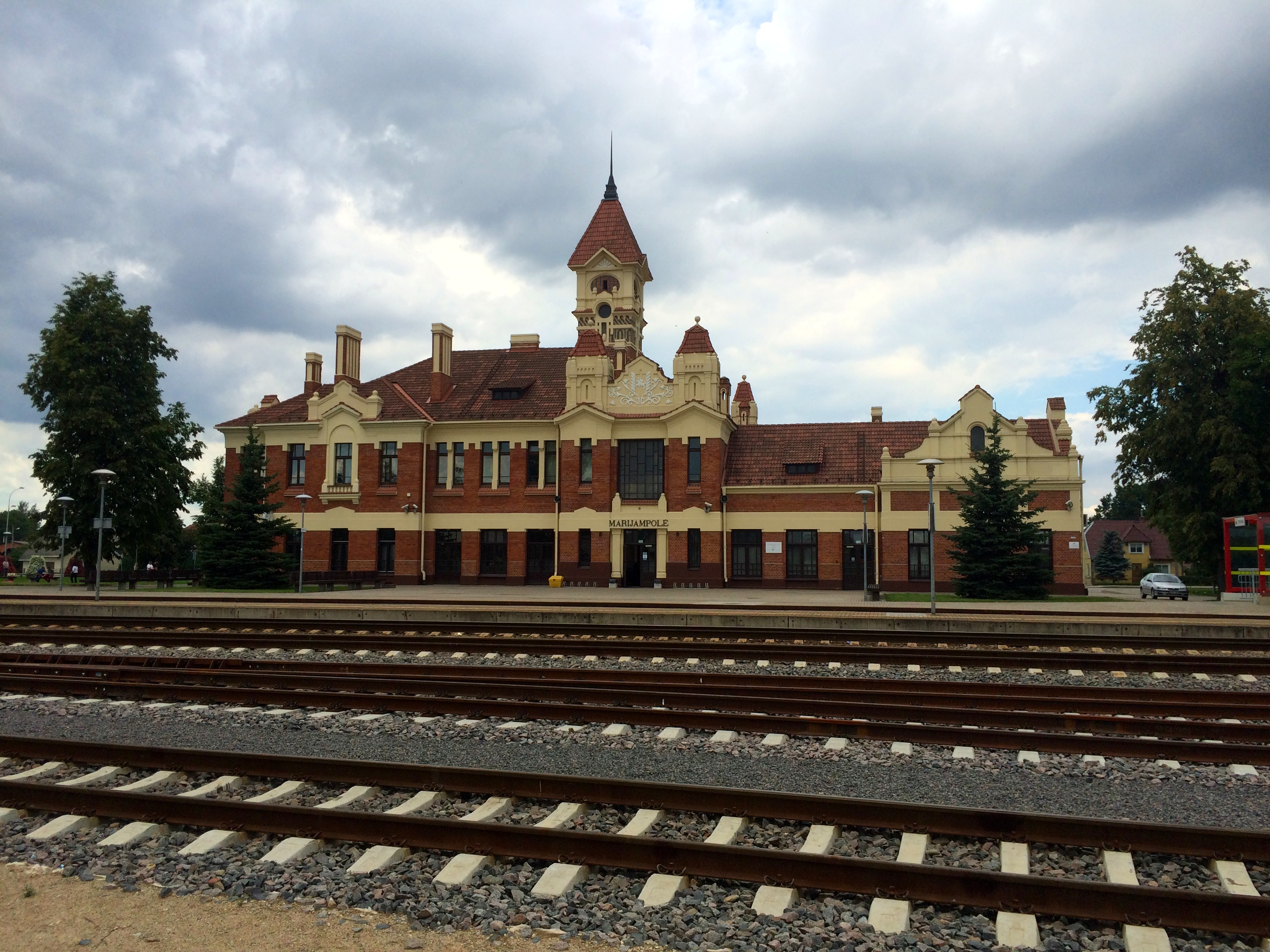 Marijampolės geležinkelio stotis